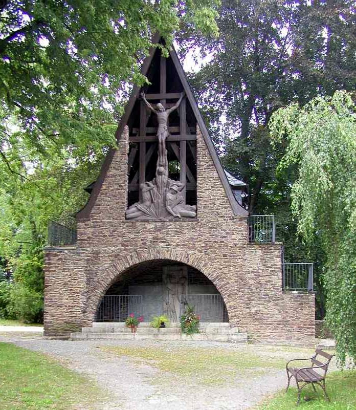 Kriegsdenkmal in Lauter/Sa.